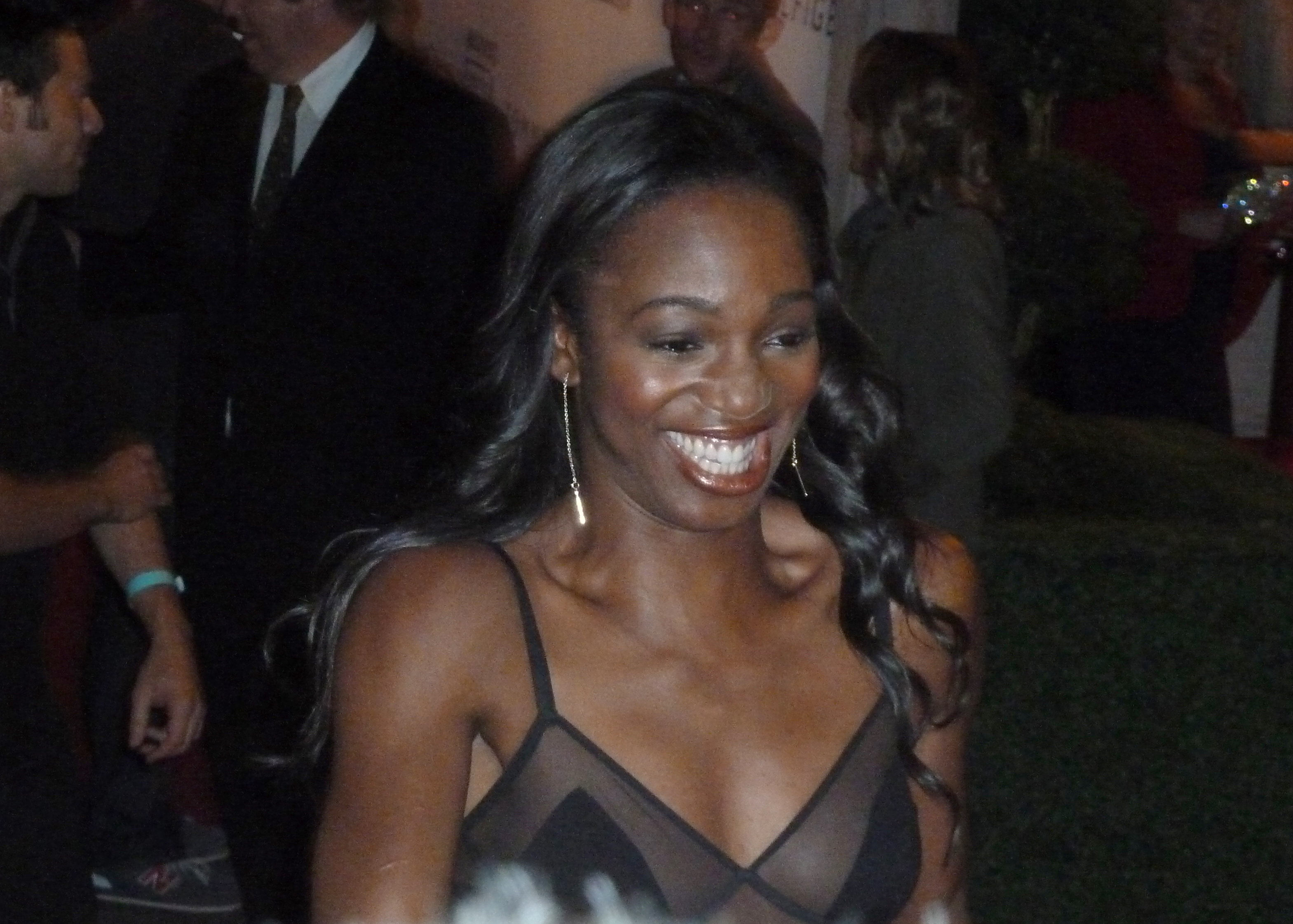 Enuka Okuma Instyle Party Toronto Film Festival 2011